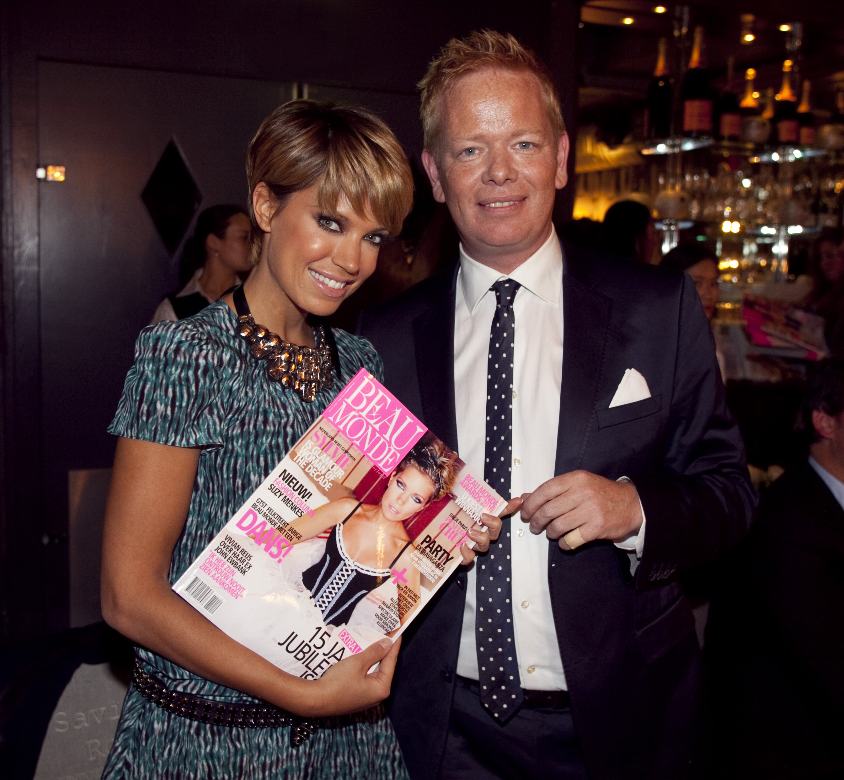 Silvie van der Vaart